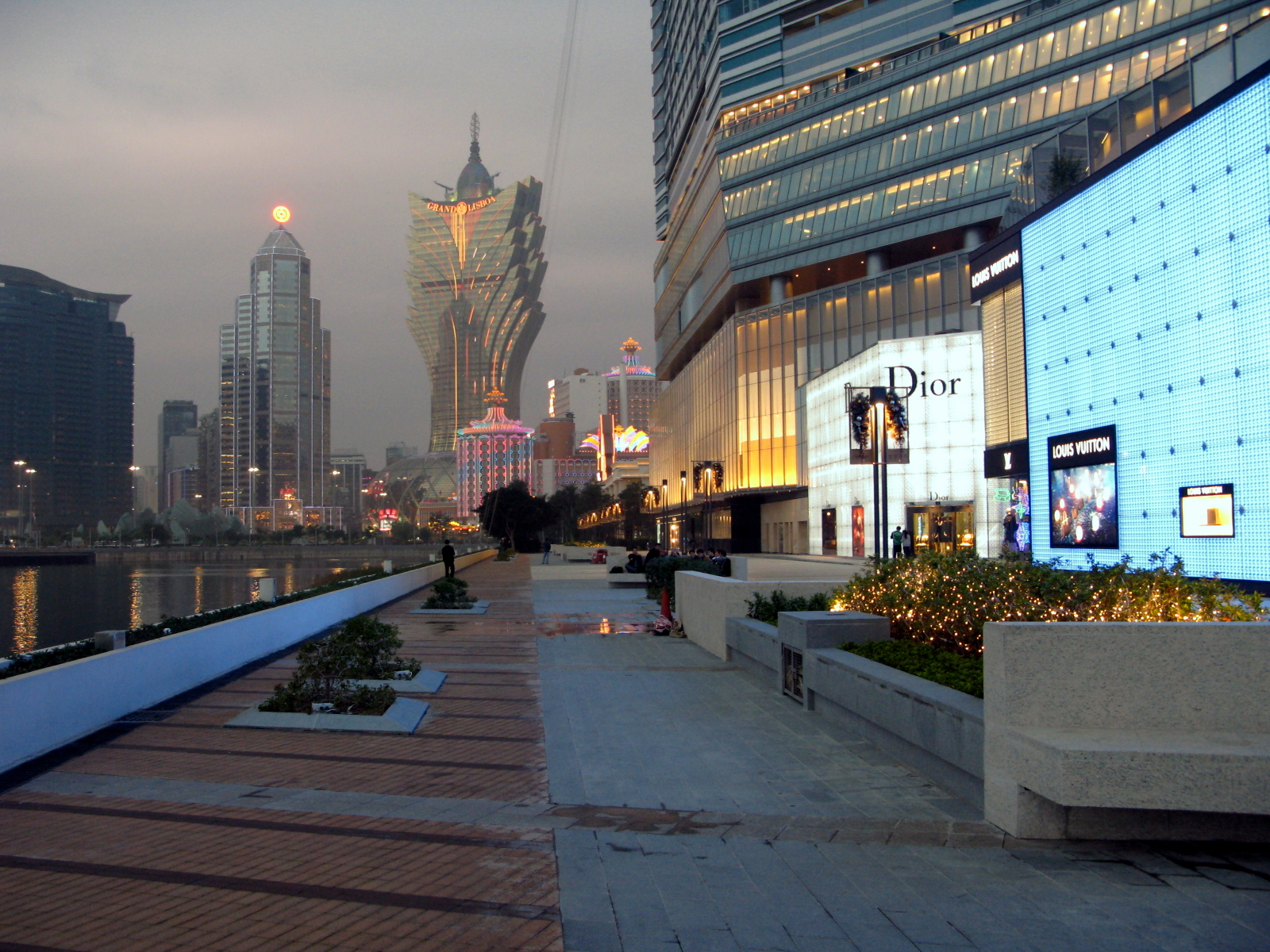 One Central Plaza Promenade 壹號廣場海濱長廊